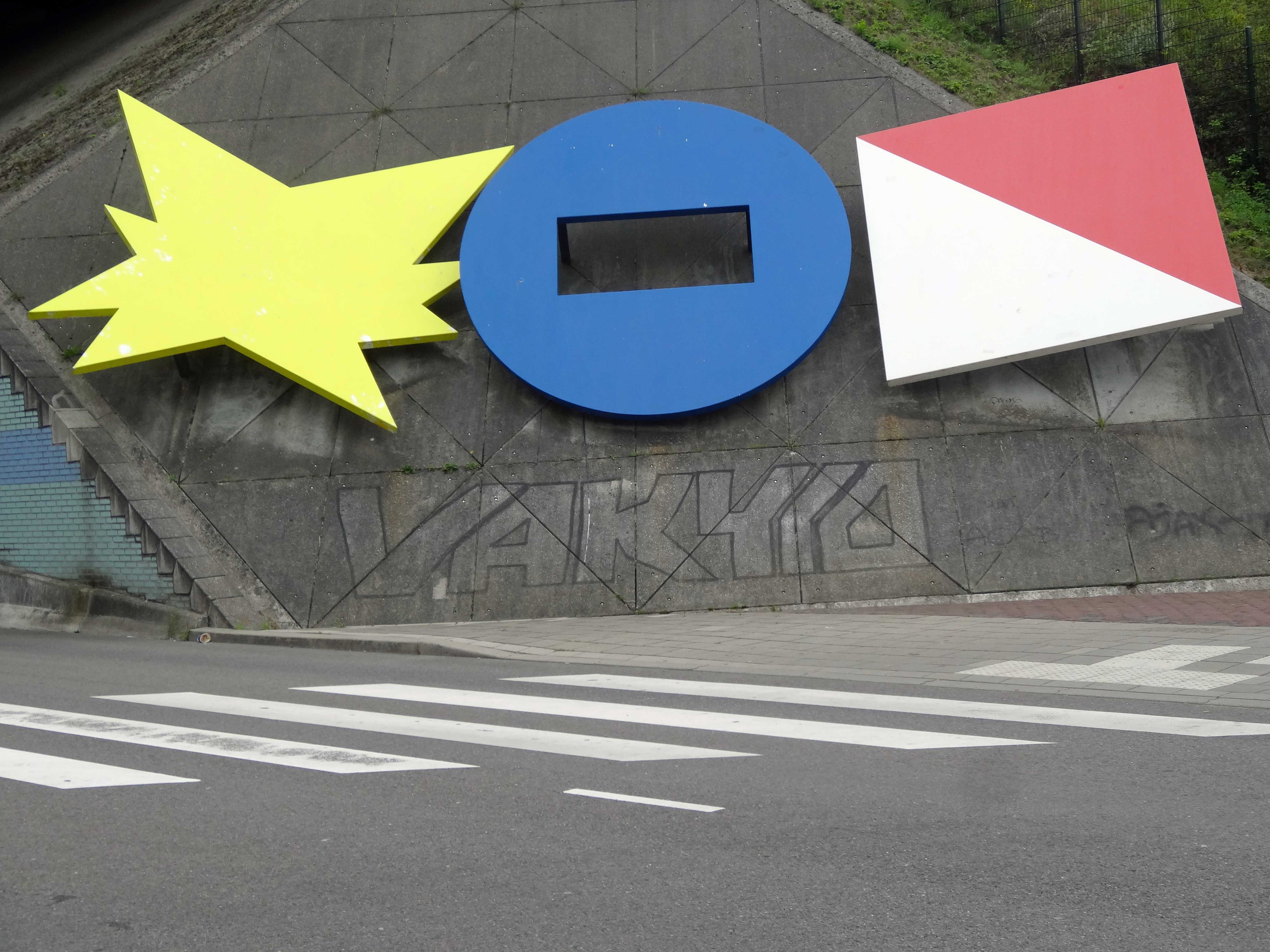 Een deel van het Kunstwerk Stationsplein Duivendrecht